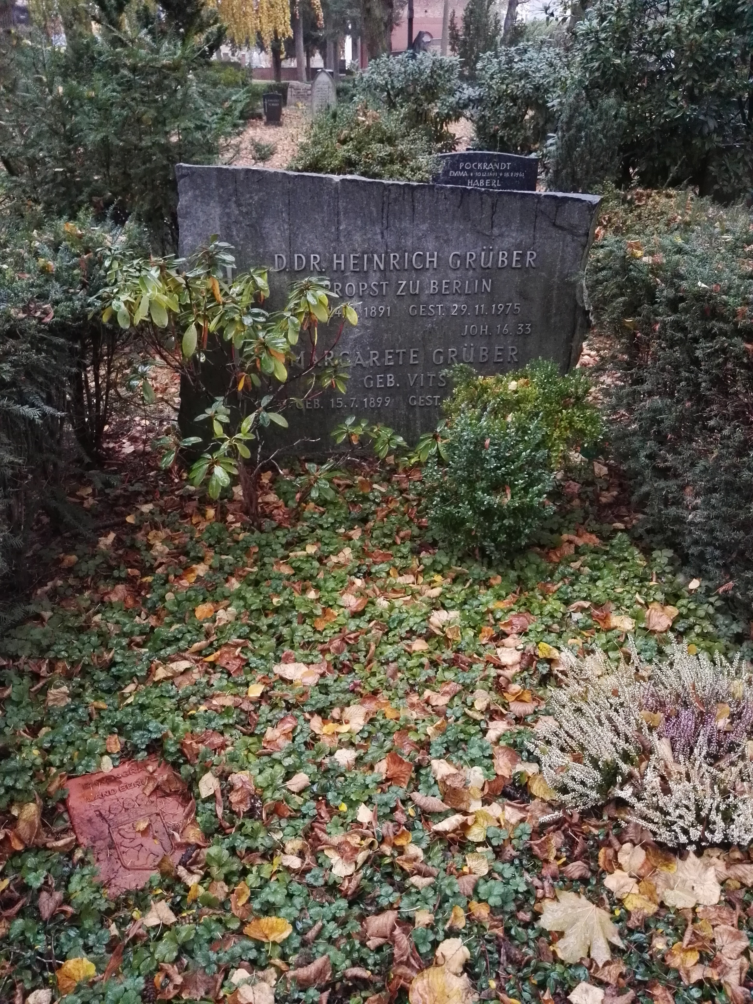 Grab von Heinrich Grüber auf dem Dom-Friedhof II in Berlin-Mitte; Ehrengrab der Stadt Berlin